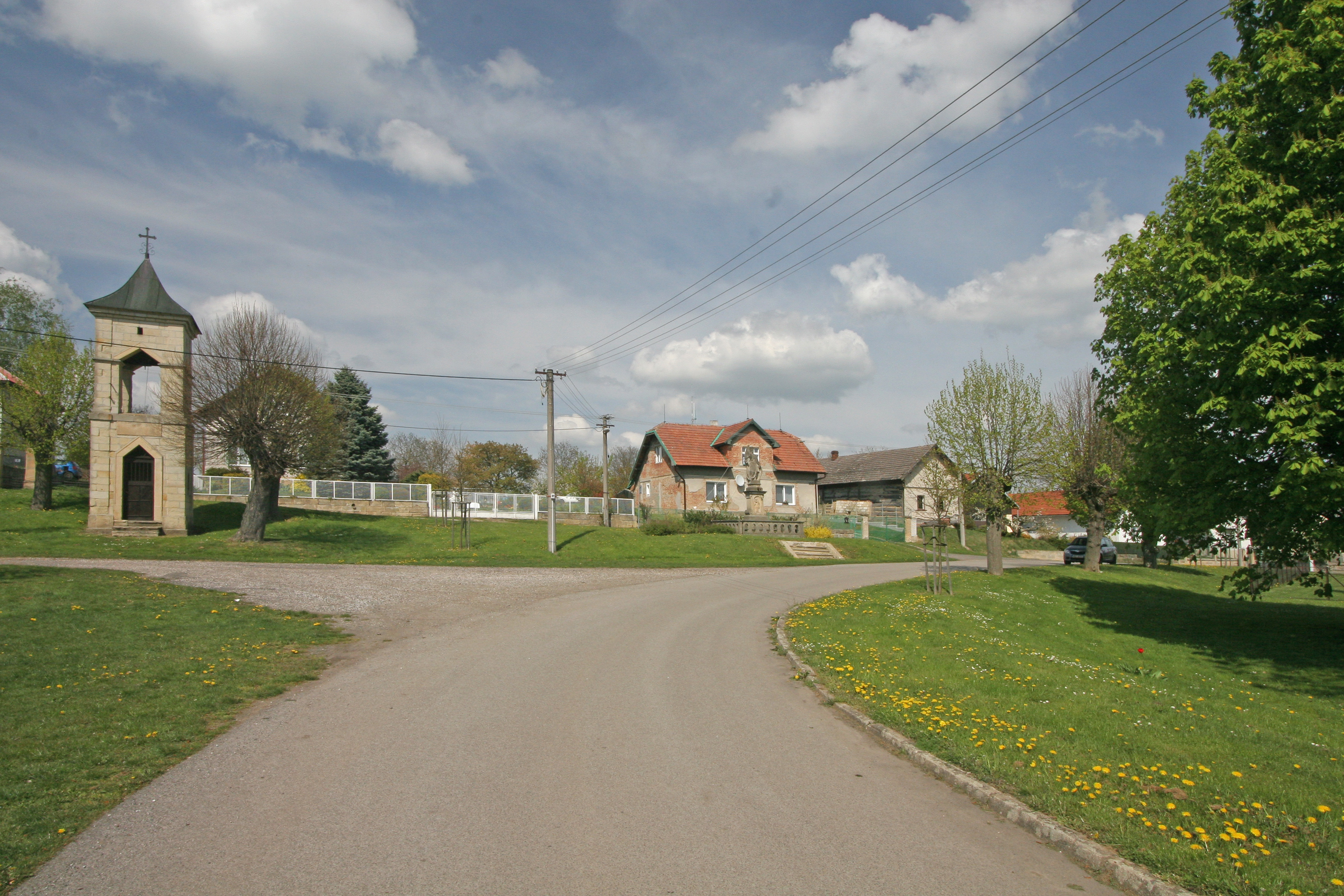 Češov náves